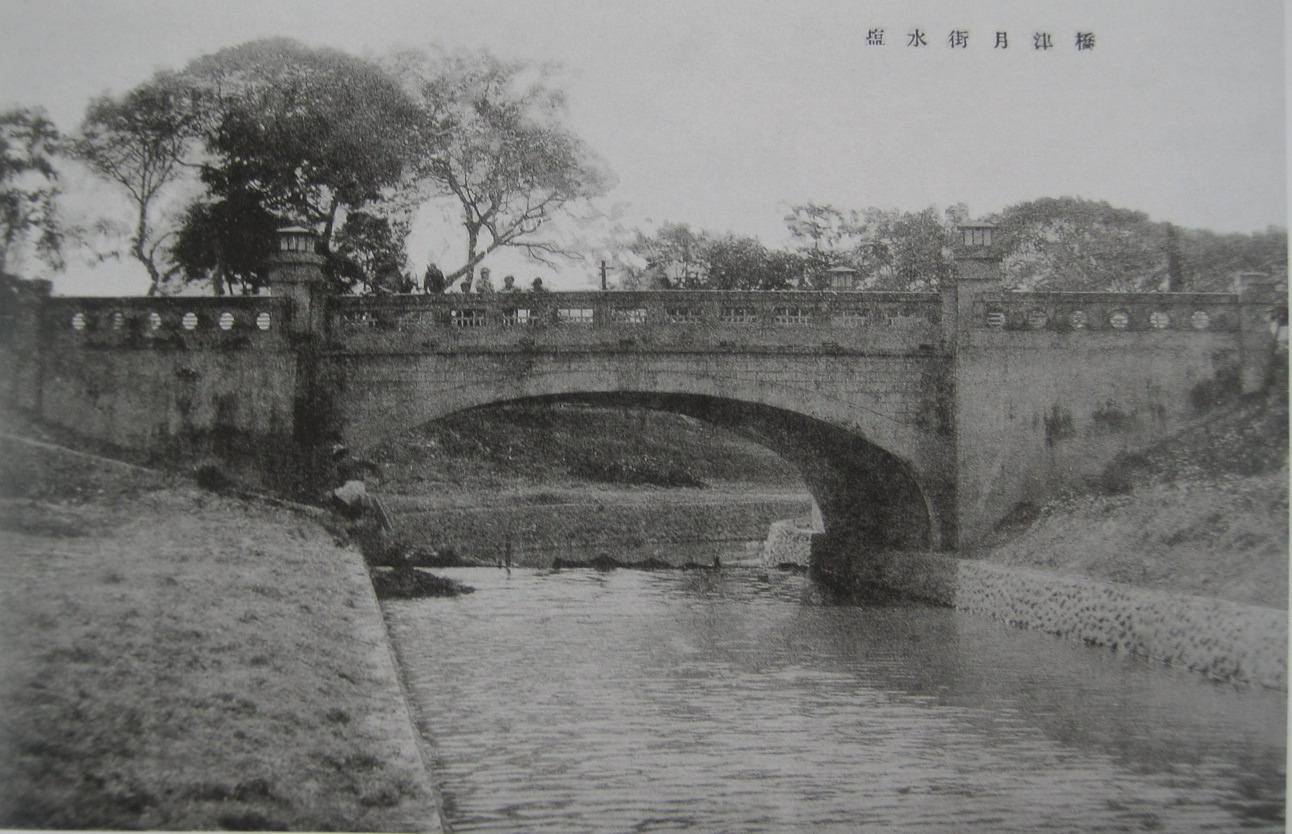 鹽水街月津橋